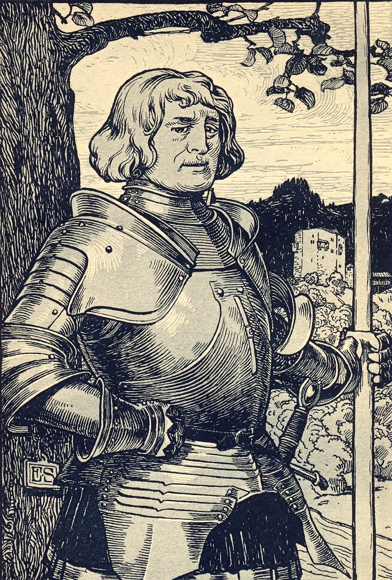 Ritter Hans Imer (vor 1469 – 1533) vor der Burg Gilgenberg im Kanton Solothurn